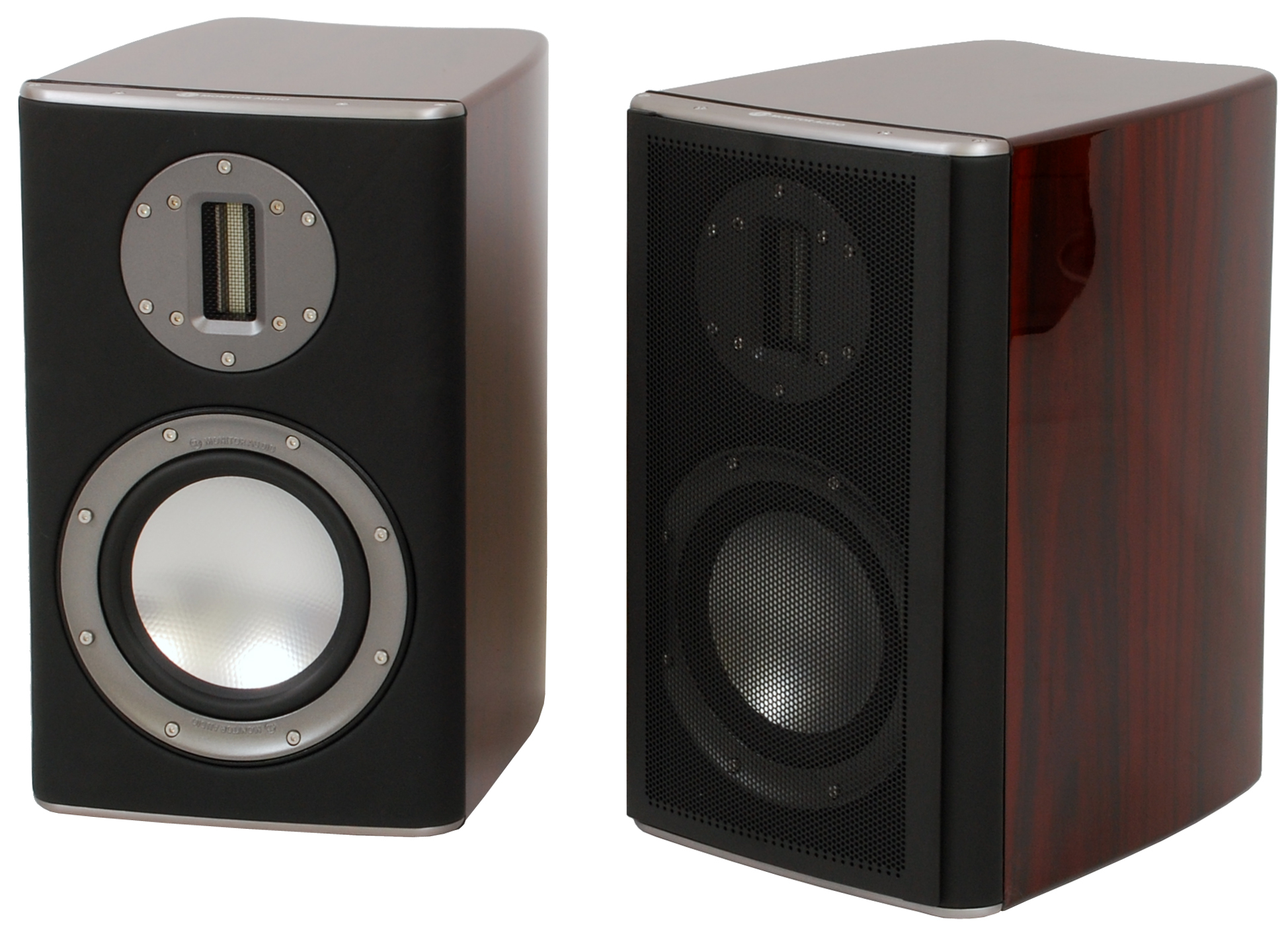 Kolumny podstawkowe PL100 Platinum firmy Monitor Audio